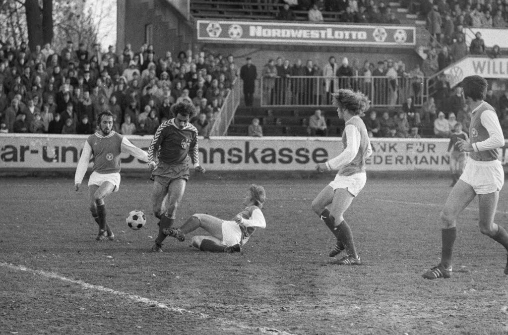 Fußballspiel Holstein Kiel gegen Bayer Uerdingen im DFB-Pokal, 0:1